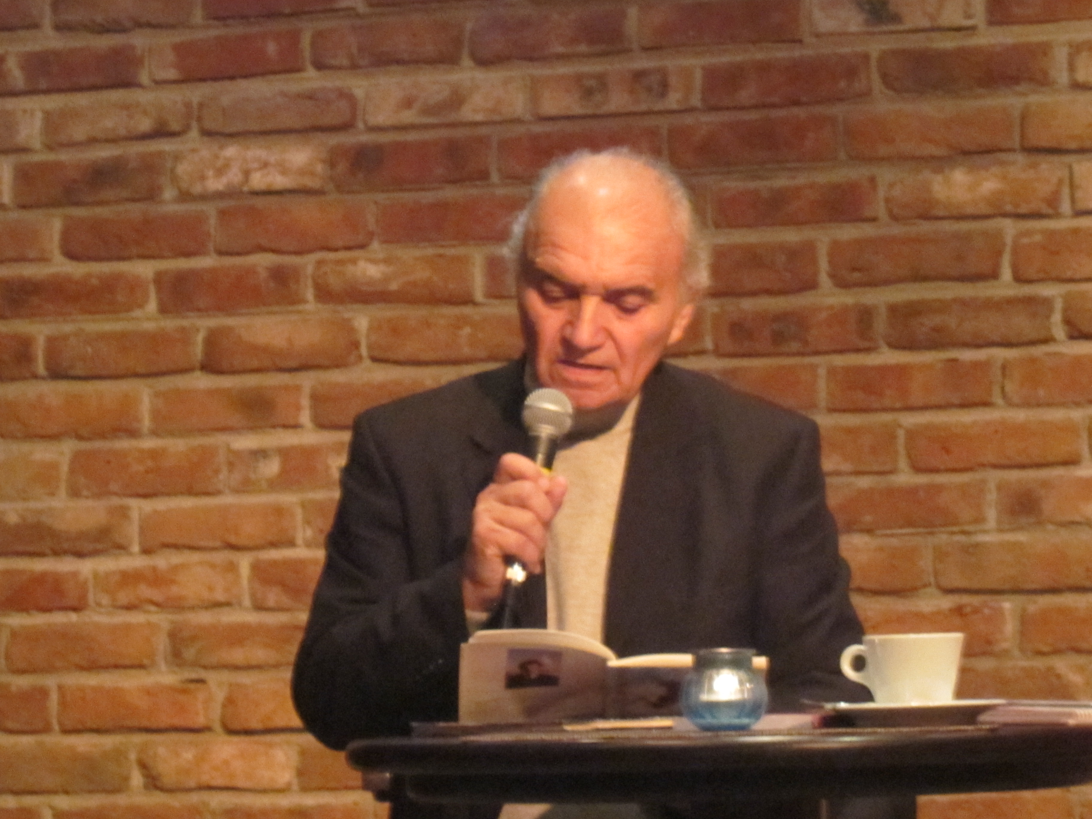 Красин Химирски